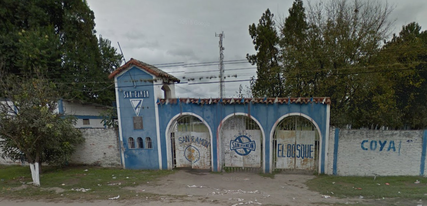 Club Deportivo y Cultural San Ramón